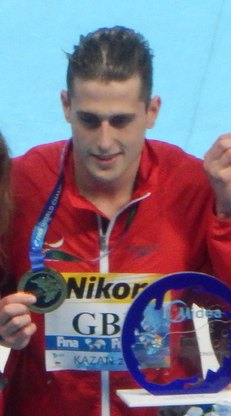 Великобритания берёт золото с мировым рекордом в смешанной комбинированной эстафете